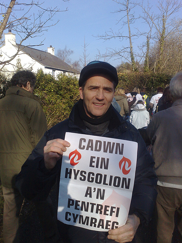 Bryn Fôn - Taith Gerdded Cadwn Ein Hysgolion